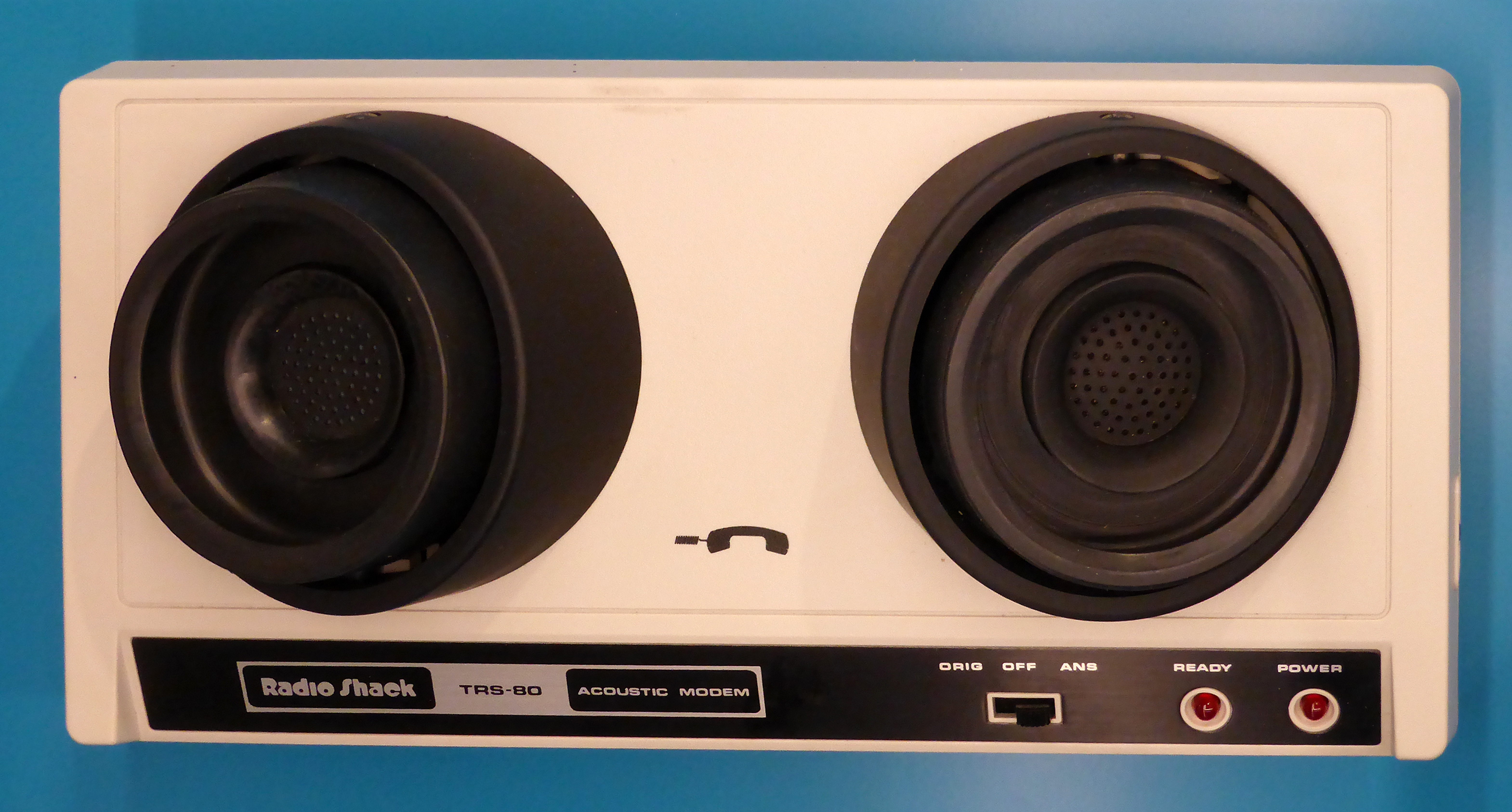 Akustikkoppler RadioShack TRS 80 im Deutschen Technikmuseum in Berlin. Wikipedianische KulTour am 10. Oktober 2015 in der Ausstellung des Museums.